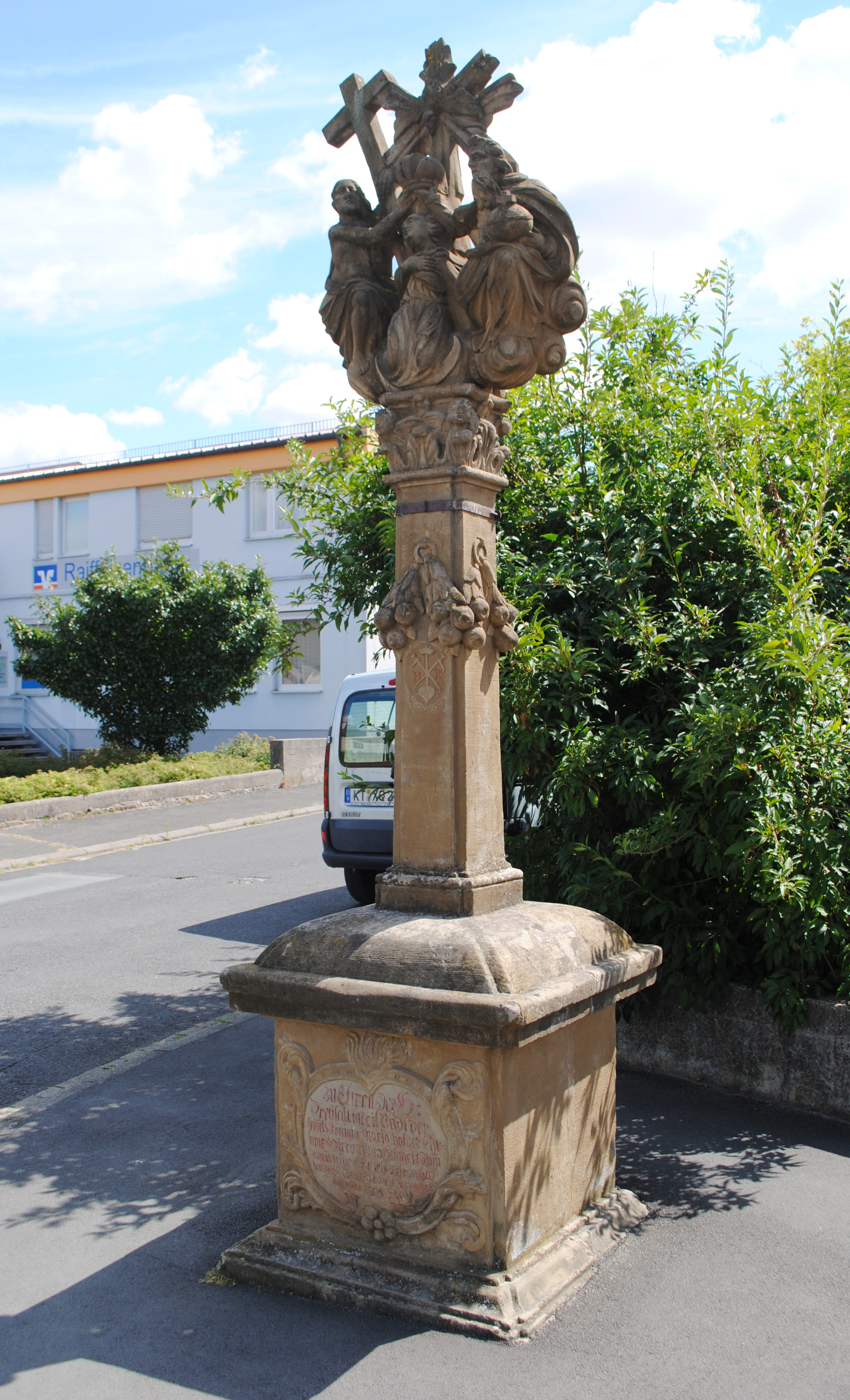 Bildstock, Mariae Krönung, Raiffeisenstraße, Nordheim am Main